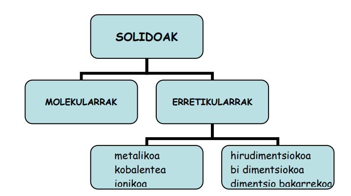 Solido mota ezberdinen konparaketa